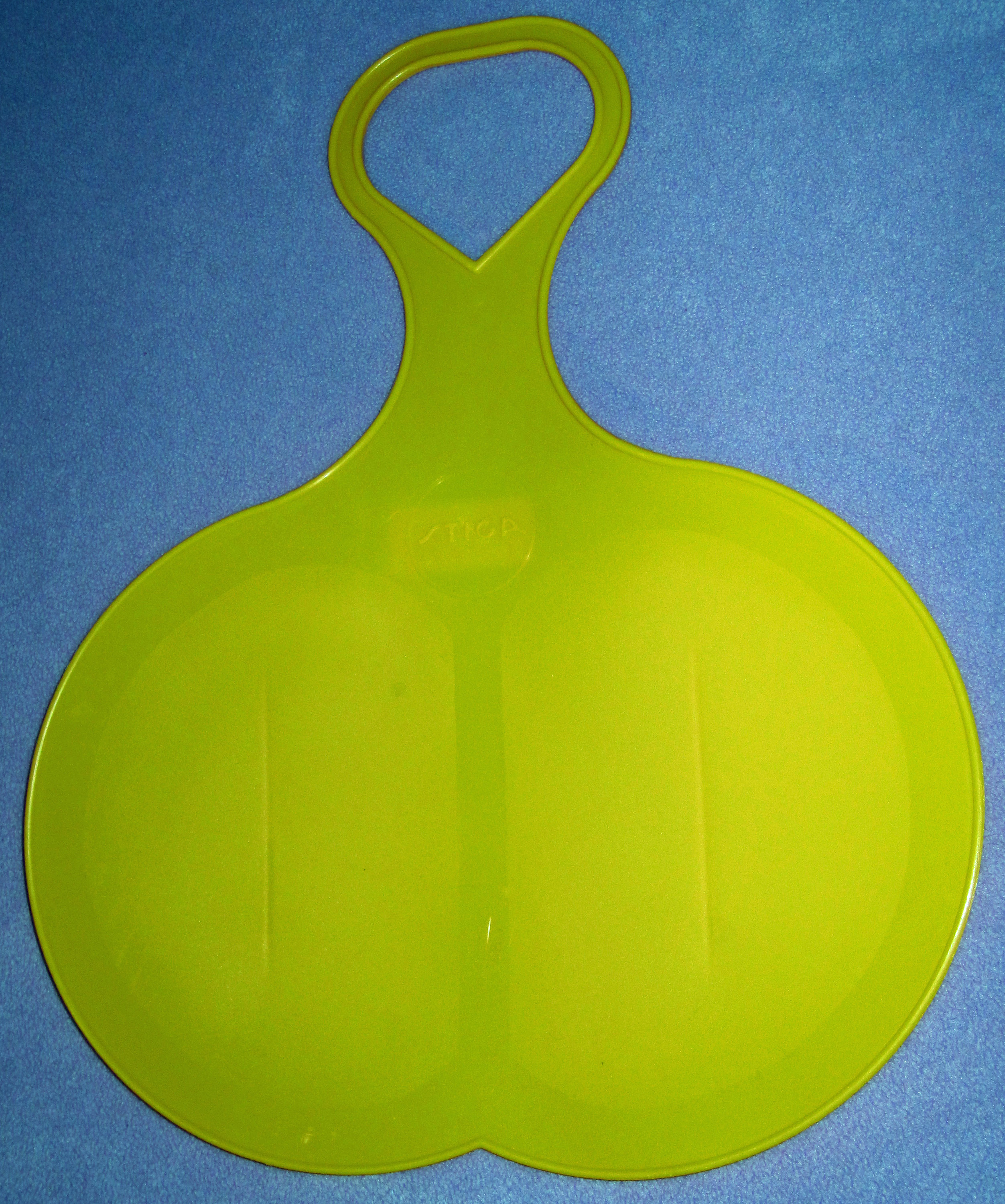 Stjärtlapp